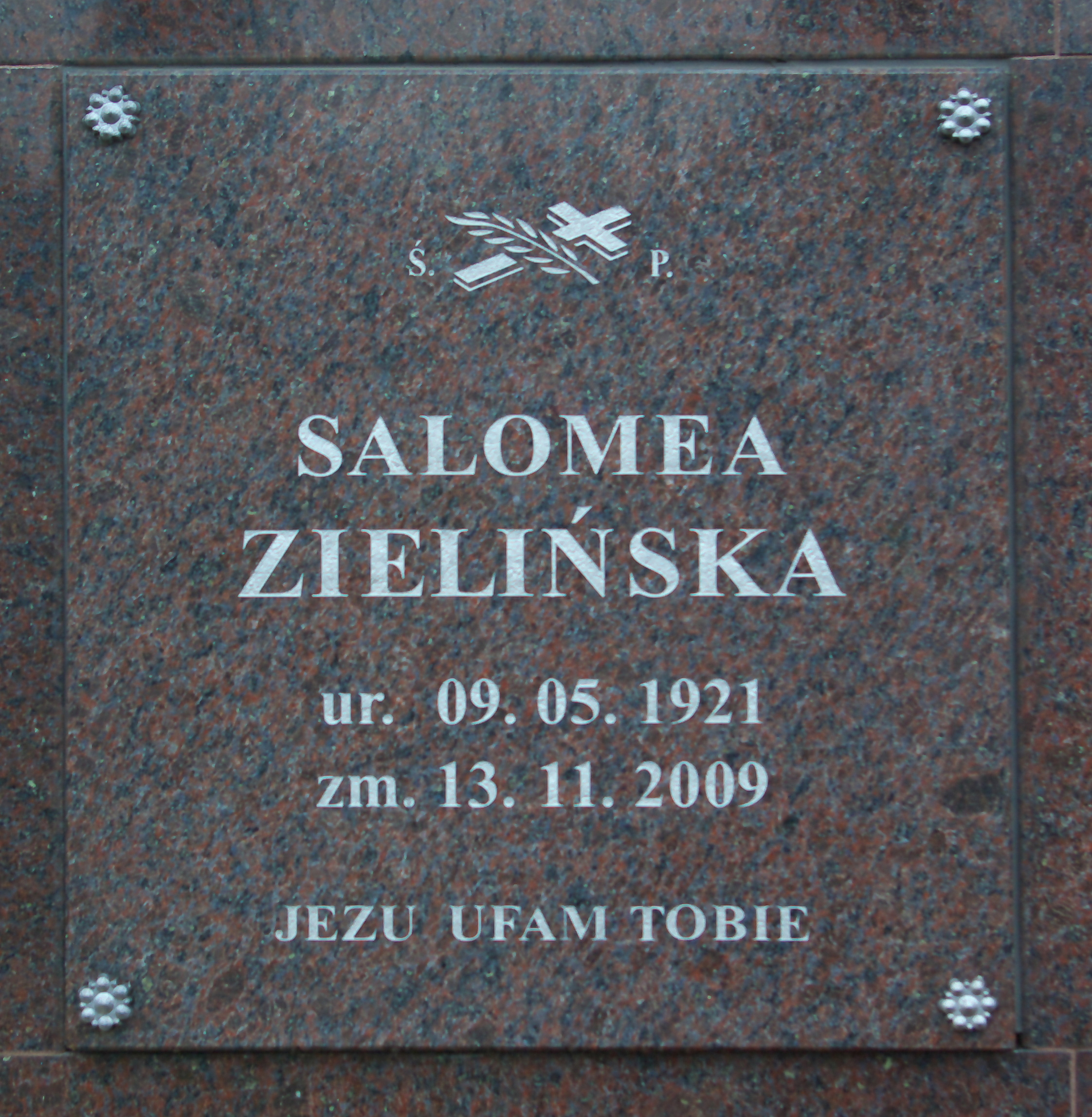 Miejsce pochówku prochów Salomei Zielińskiej na Cmentarzu Centralnym w Sanoku (kolumbarium).